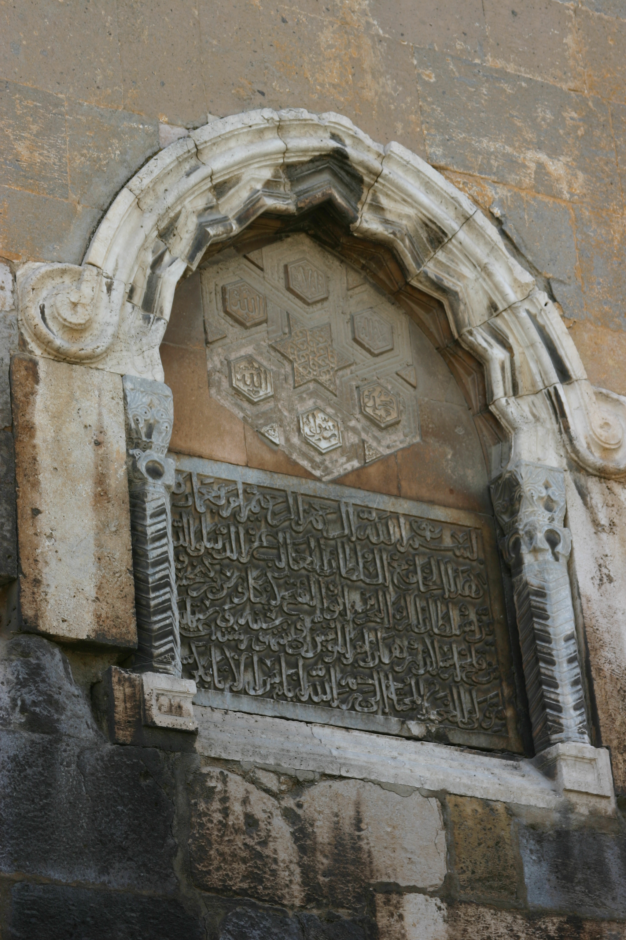 Inscrição árabe no exterior da Mesquita de Alaeddin, em Konya